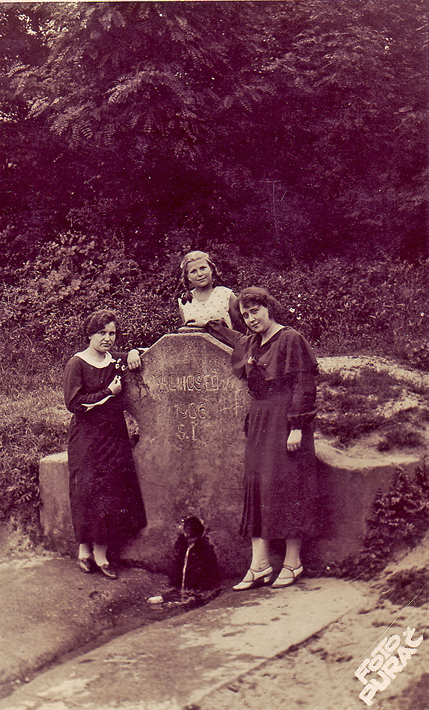 Fotografijo je naredil Foto Purač, znani fotograf iz Murske Sobote. Predstavlja pa zajetje vode v letu 1906, ki so ga vaščani Gorice imenovali Mlaka. Letos t.j.2006 je torej stara 100 let. Na sliki levo je soseda Fartelj Karolina, potem poročena z evangeličanskim duhovnikom Jonaš Štefanom, katerega gmajna je bila v Gornjih Petrovcih. V sredi slike je deklica, ki se je pisala Podlesek, desno pa je učiteljica iz Puconcec Lokaj Elza, ki je pozneje živela v Mariboru v Sodni ulici.